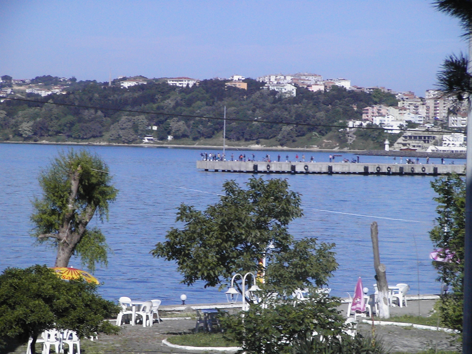 Ömür Tanyel'in kendi çekimi